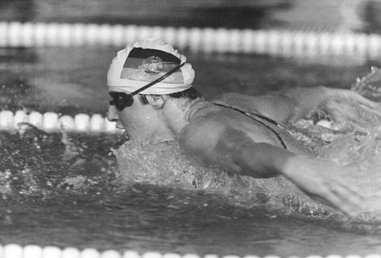 Ute Geweniger ADN-ZB Mittelstädt 2.9.81 Berlin: Vorschaumotiv zu den Europameisterschaften im Sportschwimmen vom 7.-12.9.1981 in Split-Jugoslawien Zu den nominierten Athleten des DSSV der DDR gehört die zweifache Olympiasiegerin von Moskau, Ute Geweniger (Foto von einem früheren Wettkampf). Die 17jährige Karl-Marx-Städterin wurde in diesem Jahr fünffache DDR-Meisterin. Abgebildete Personen: Geweniger, Ute: Schwimmerin, DDR